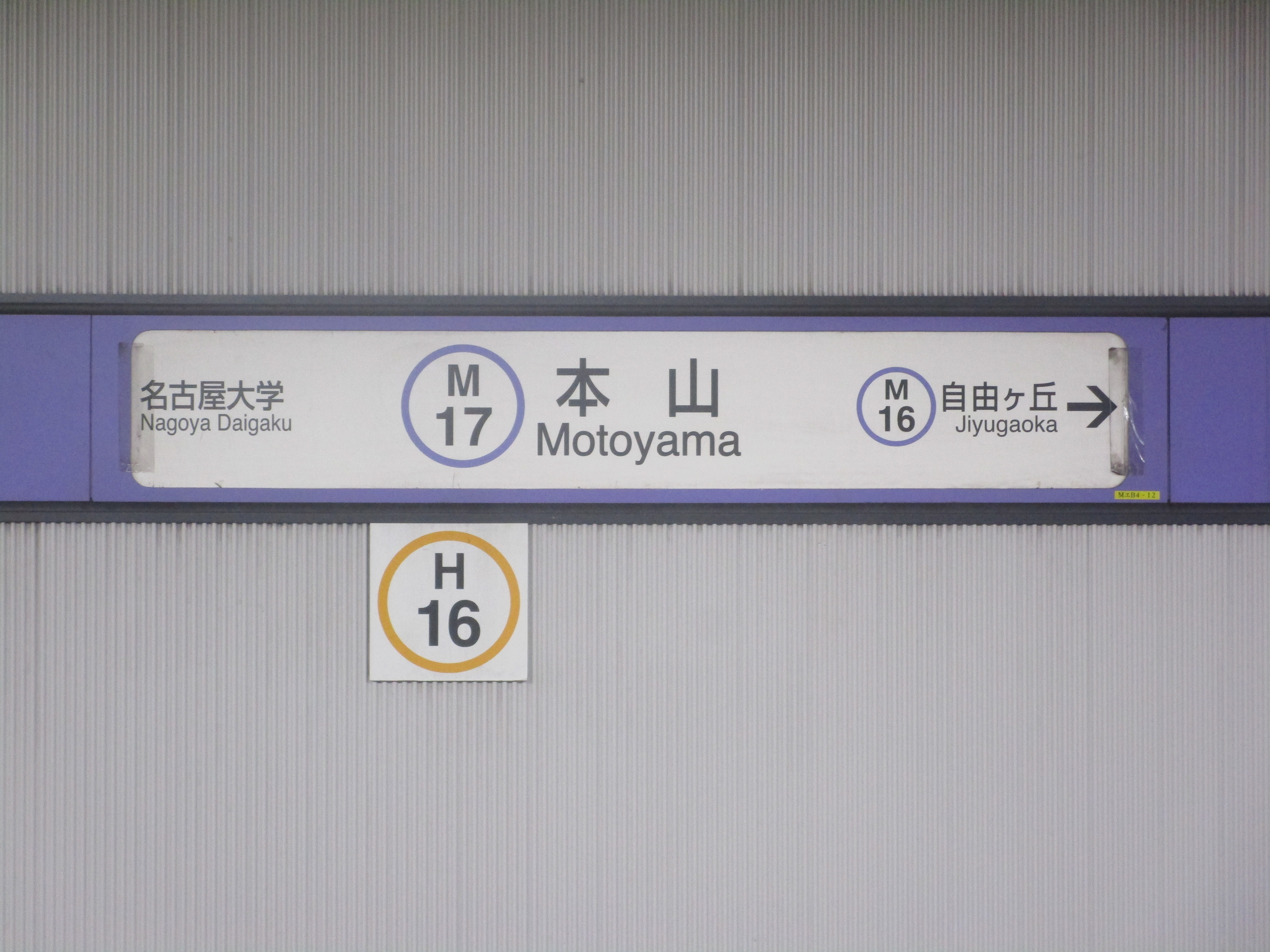 名城線本山駅の駅名標